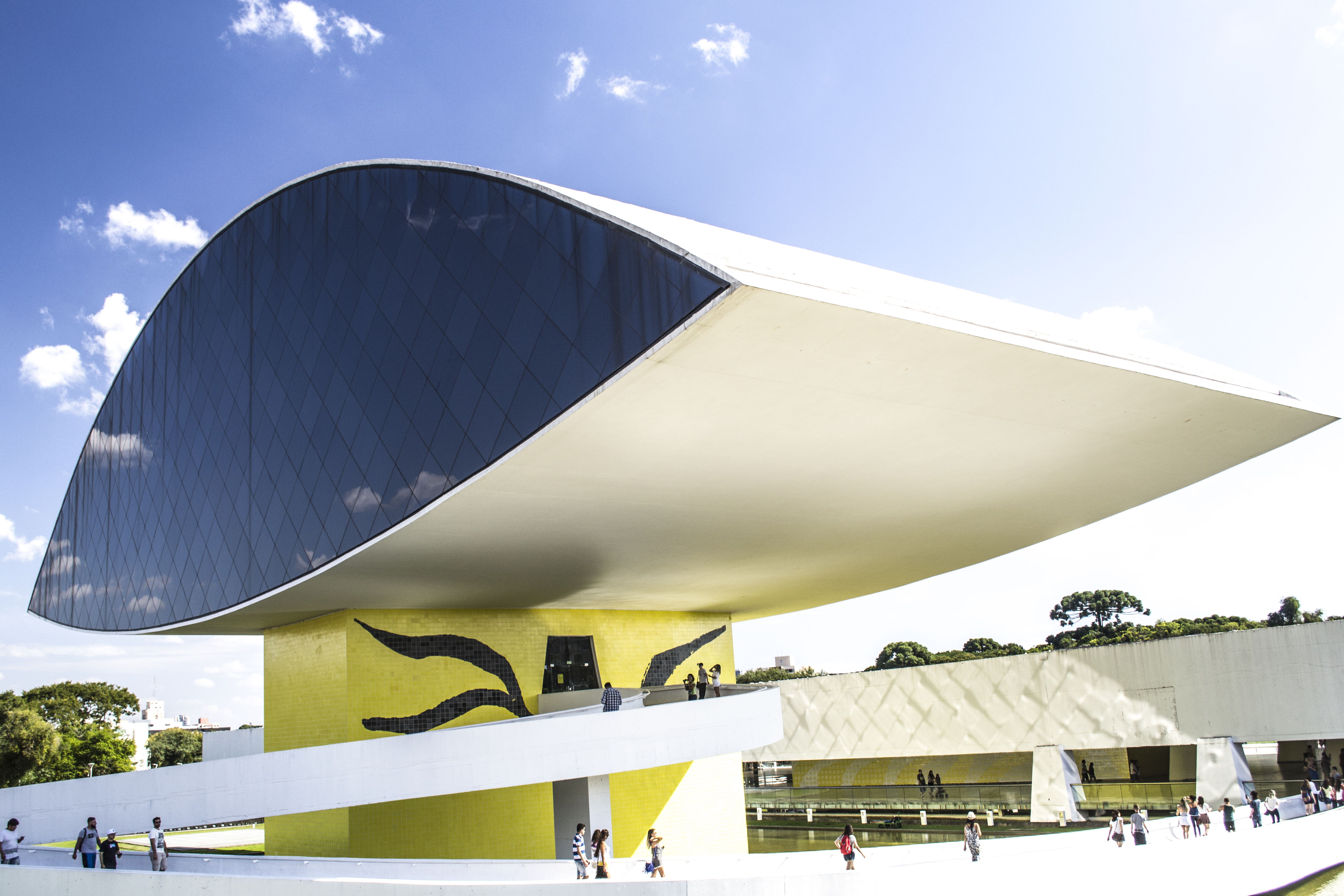 Museu Oscar Niemeyer